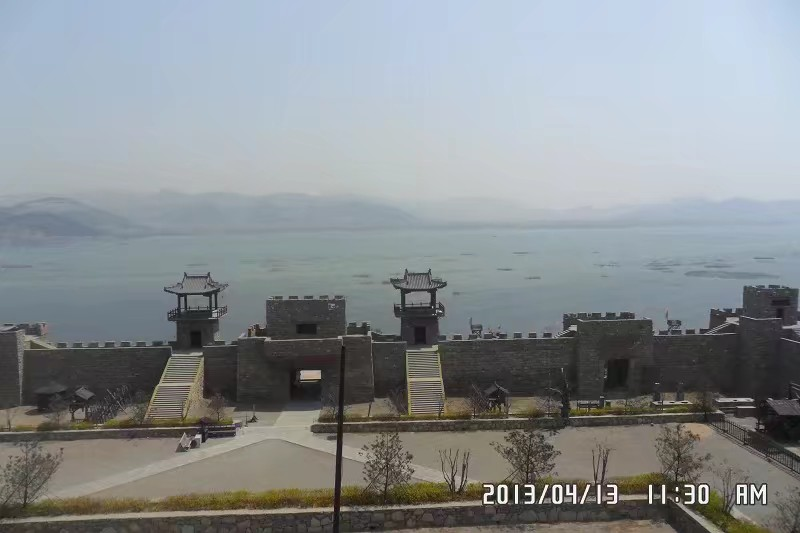 东平境内的六工山